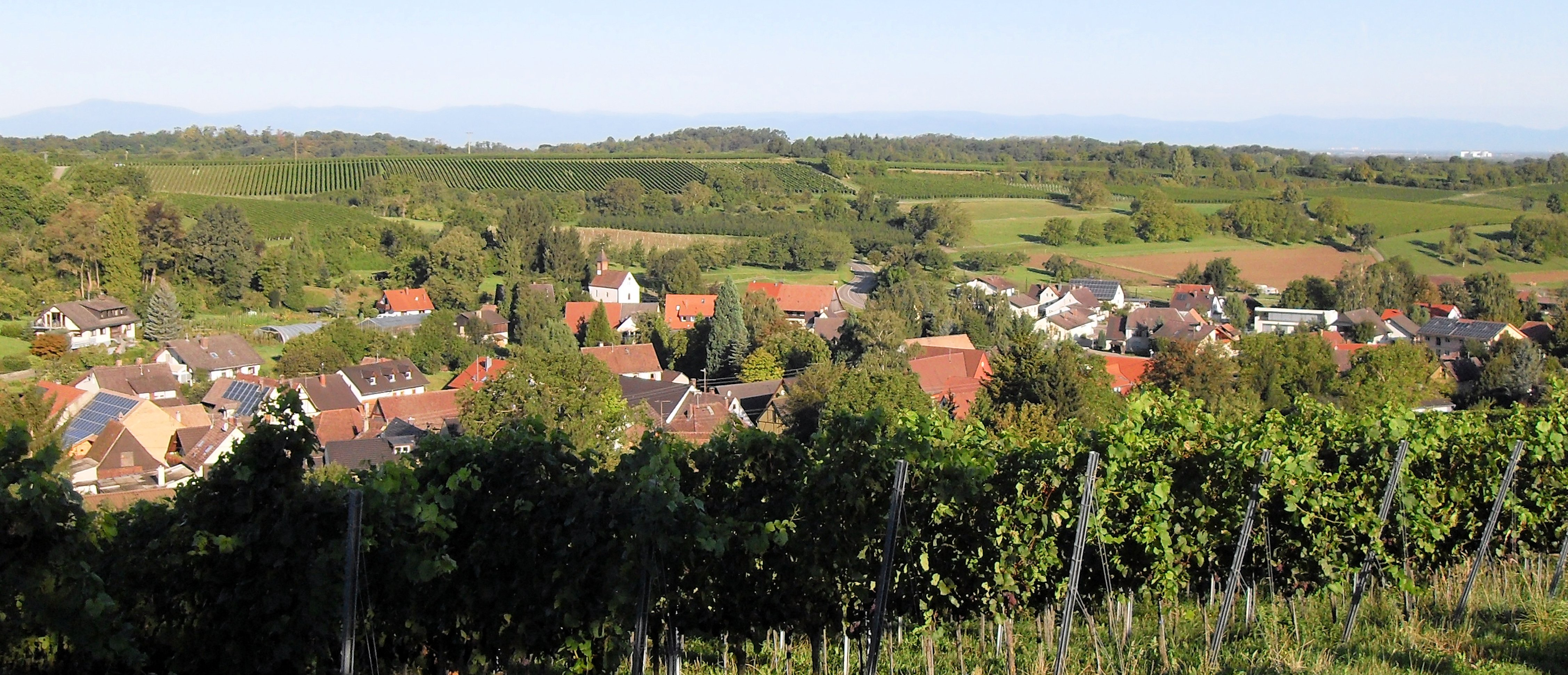 Blick aus Südosten auf den Weinort Zunzingen im Markgräflerland